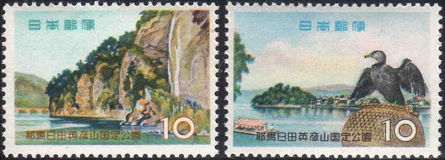 日本国郵政省が1959年に発行した耶馬日田英彦山国定公園を描く切手2種